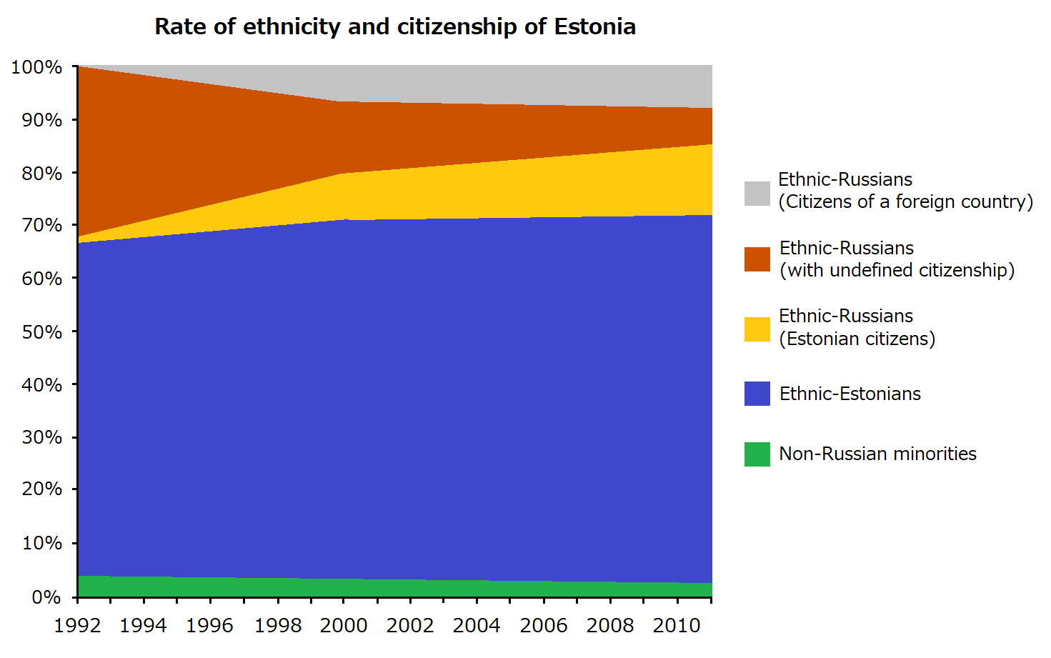 エストニア在住者の民族・国籍別の割合変化（1992年 - 2011年） 出典：中井遼 『デモクラシーと民族問題 - 中東欧・バルト諸国の比較政治分析』 勁草書房、2015年、188頁。 以下に同頁の中井による出典と注を引用する。 「出典：1989, 2000, 2011年国勢調査, エストニア内務省webページ（1992年国籍保有者数データ）。 注：他国市民ではないロシア語系住民が, 市民権を有するか否かについては直接のデータを政府が公開してないため, 国籍保有者データと民族比率データを照らし合わせることで推測値を出している。また, 国勢調査聴取年以外のものは線形関数による当てはめである。」